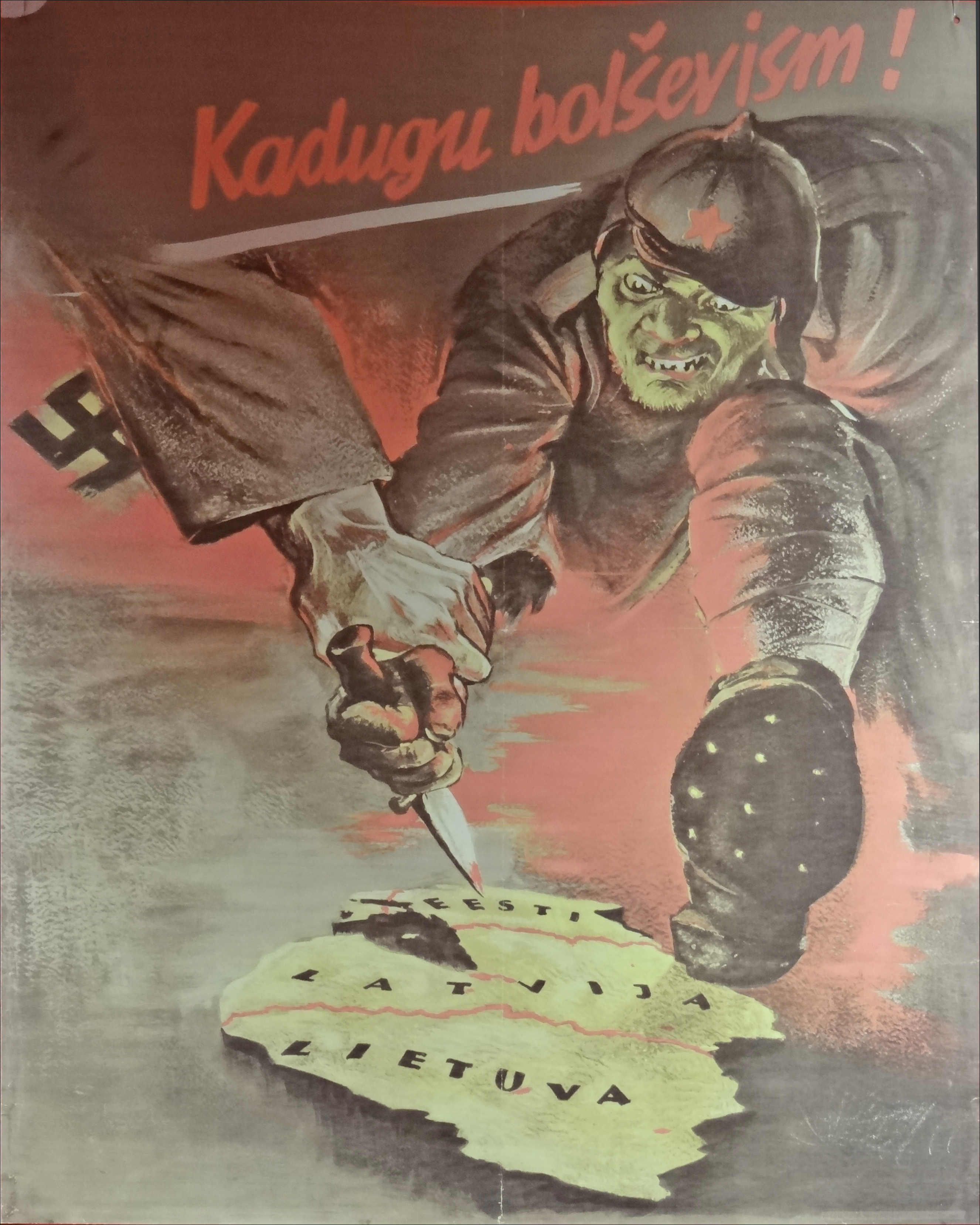 "Kadugu Bolševism", affiche de propagande de l'Allemagne nazie exposée par le musée de la ville de Tallinn dans les salles consacrées à l'histoire récente Le musée de la ville de Tallinn présente le passé et les grandes étapes du développement de la ville jusqu'à l’indépendance en 1991. En 1710, le territoire estonien devient une région de l'Empire russe. En 1920, à l'issue de la Première Guerre mondiale, qui a déclenché l'effondrement de l'Empire russe, l'Estonie acquiert, comme ses voisins baltes, son indépendance. En 1940, l'Union soviétique occupe l'Estonie (accord secret figurant dans le Pacte germano-soviétique de 1939) En 1941, l'Allemagne nazie envahit l'Estonie, à l'issue de sa déclaration de guerre à l'Union soviétique. En 1944, le pays est reconquis par l'Armée rouge et transformé en une République Socialiste intégrée à l'URSS. Une forte minorité russe s'installe pour fournir des bras aux nouvelles activités industrielles et militaires. L'éclatement de l'Union soviétique en 1991 permet à l'Estonie de retrouver son indépendance à l'issue d'un processus pacifique. Extrait de l'article de Wikipedia sur l'Estonie _______________ Les pays baltes qui représentaient, pour le tsar Pierre le Grand, la "fenêtre sur l'Europe" ont été très convoités au cours des siècles. Polonais, russes, allemands, scandinaves y ont laissé des traces importantes à l'issue des guerres et des occupations de ces territoires. Les villes maritimes de ces pays sont fortement marquées par la ligue de la Hanse qui prit naissance en 1241, elles commerçaient avec les villes anglaises, russes, polonaises et scandinaves. Musée de la ville de Tallinn linnamuuseum.ee/linnamuuseum/en/